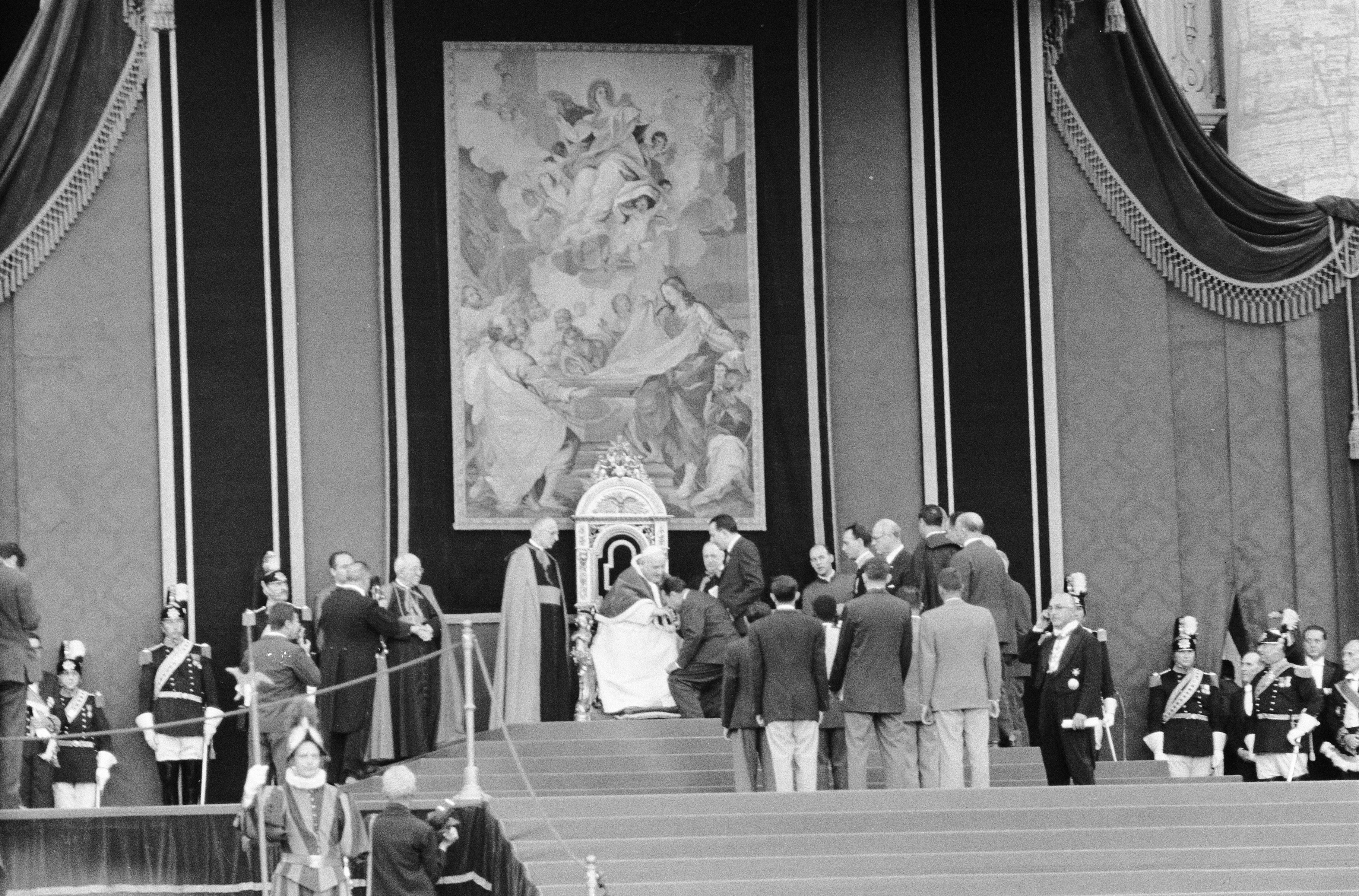 Collectie / Archief : Fotocollectie Anefo Reportage / Serie : [ onbekend ] Beschrijving : Olympische Spelen te Rome, Paus Johannes XXIII zegent de deelnemers aan de Spelen Datum : 28 augustus 1960 Locatie : Rome, Vaticaanstad Trefwoorden : cameralieden, fotografen, pausen Fotograaf : Pot, Harry / Anefo Auteursrechthebbende : Nationaal Archief Materiaalsoort : Negatief (zwart/wit) Nummer archiefinventaris : bekijk toegang 2.24.01.05 Bestanddeelnummer : 911-5390